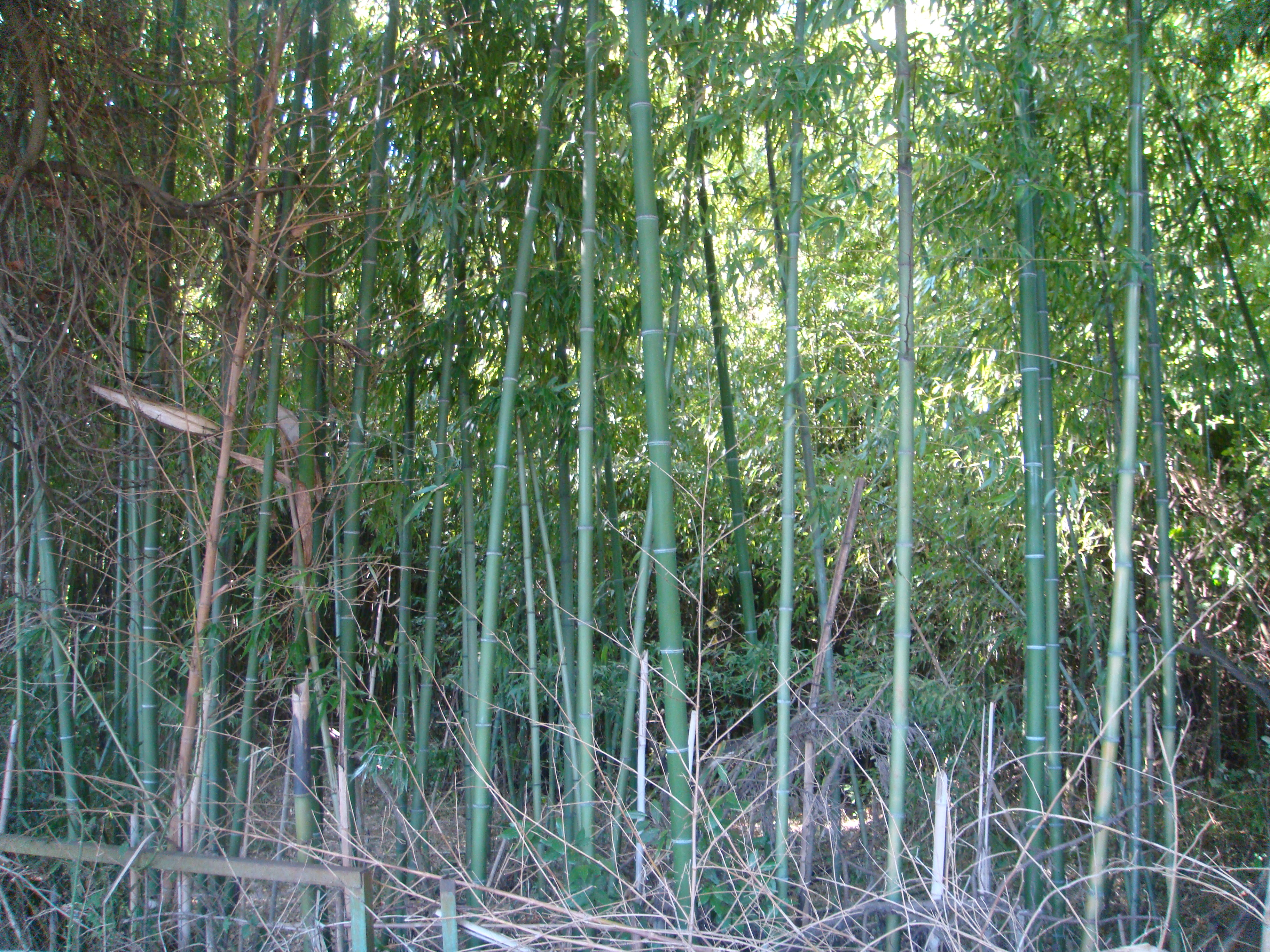 придорожный бамбук